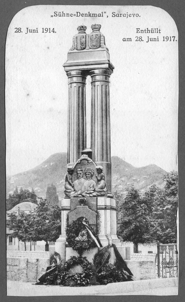 Ferenc Ferdinánd emlékmű. Szarajevó, Bosznia-Hercegovina, Osztrák-Magyar Birodalom. A felvétel ismeretlen fényképész felvétele 1917. június 28-án.